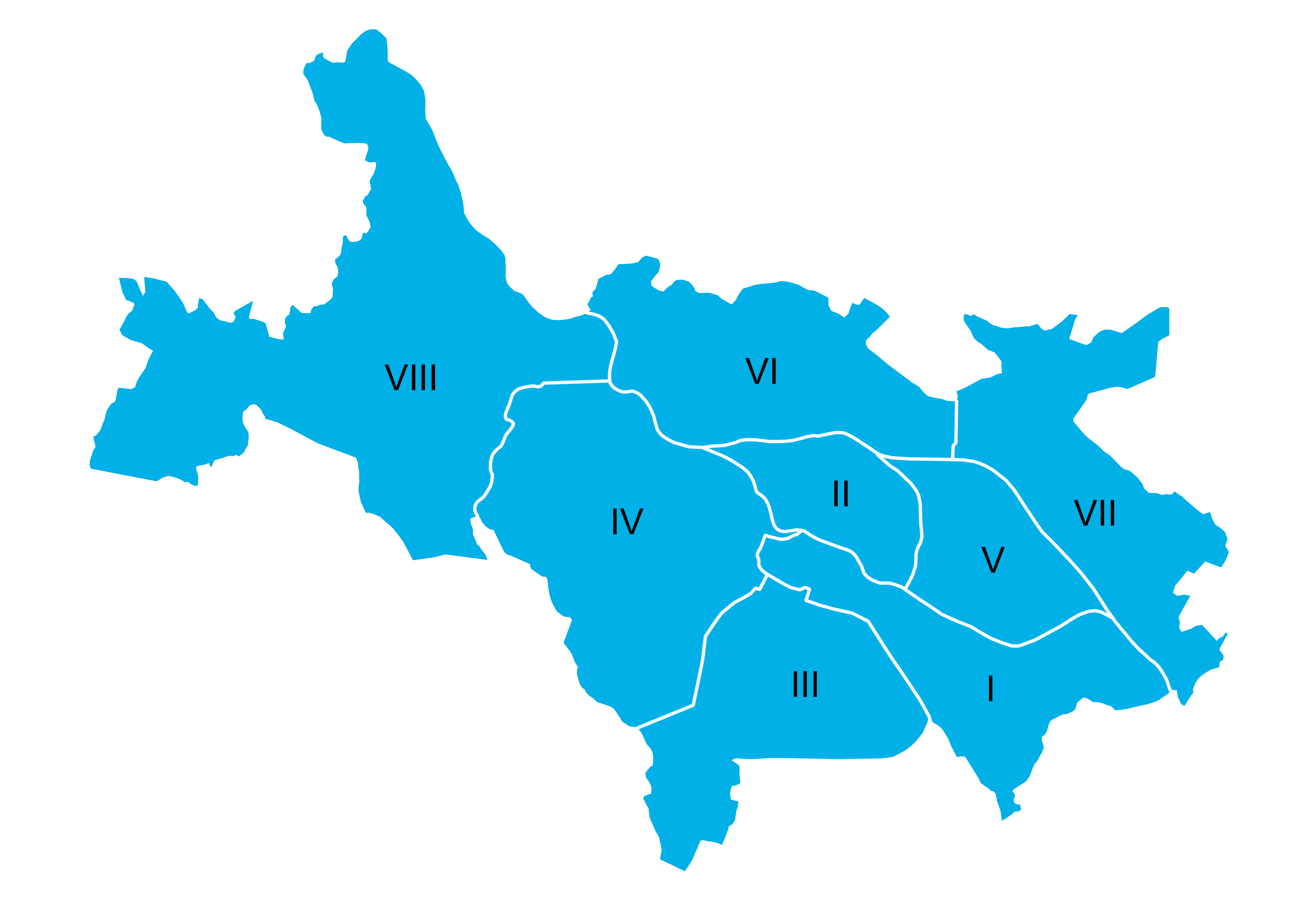 Podział Wrocławia na obwody obowiązujący w latach 1946-1952